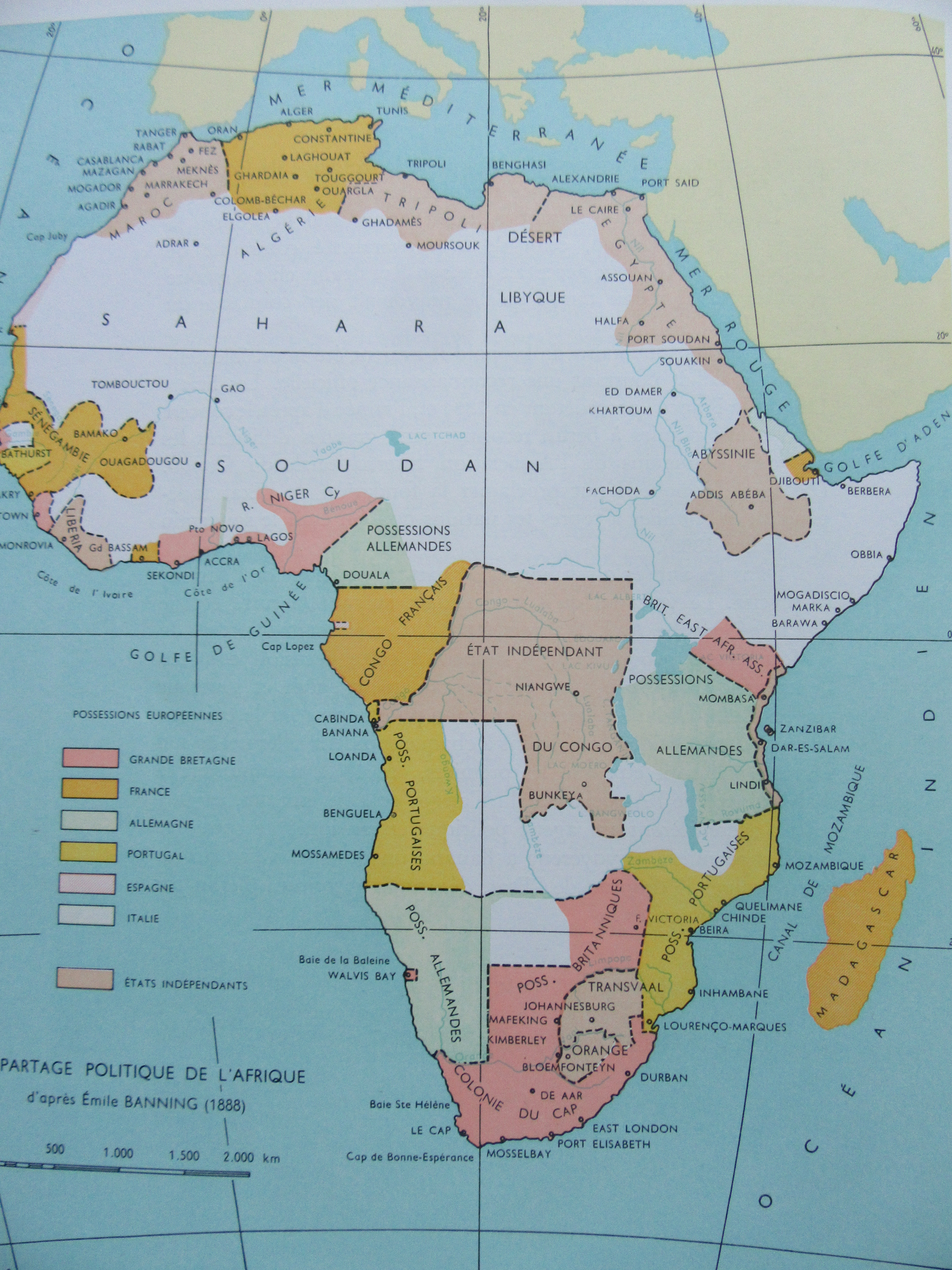 Carte du partage politique de l'Afrique sur base de données de 1888 par E Banning